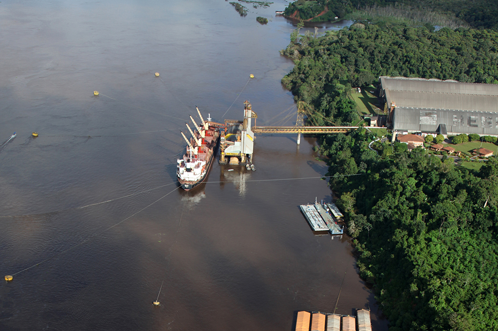 Itacoatiara (AM)